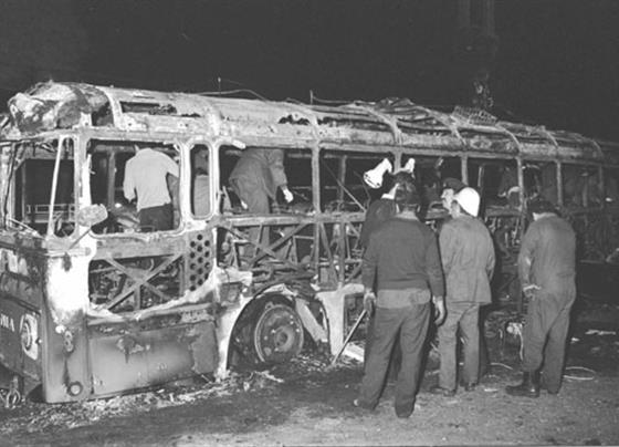 פיגוע כביש החוף, 1978, האוטובוס הפגוע